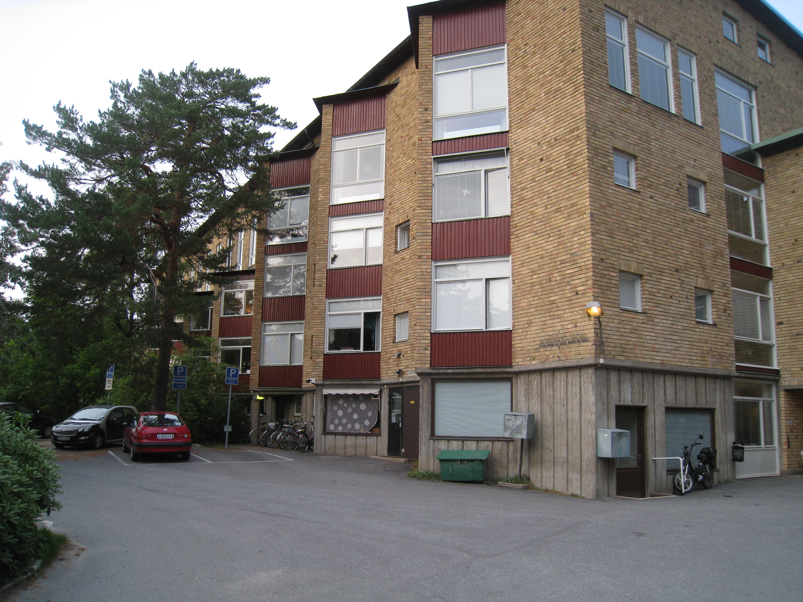 Elfvinggården, Lyckovägen 9, Äppelviken, inom stadsdelen Alvik, i Bromma väster om Stockholm. Fastigheten, som stod klar 1940, byggdes av byggmästaren Olle Engkvist och ritades av Backström & Reinius Arkitekter AB.